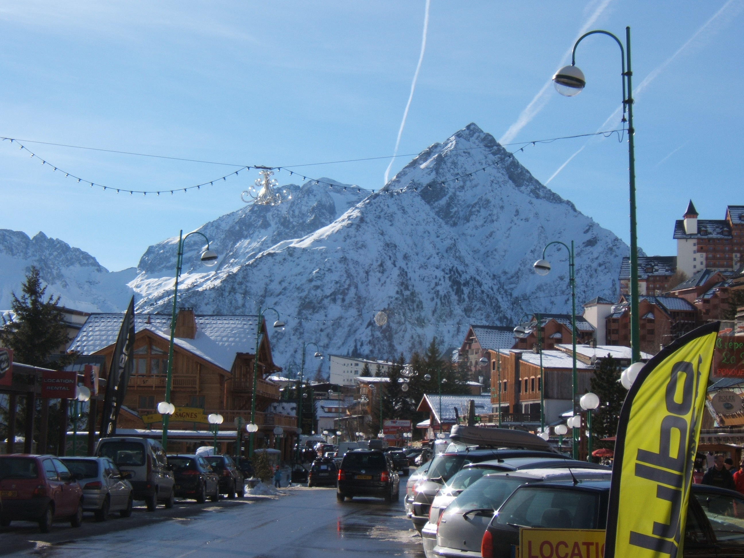 38860 Mont-de-Lans, France